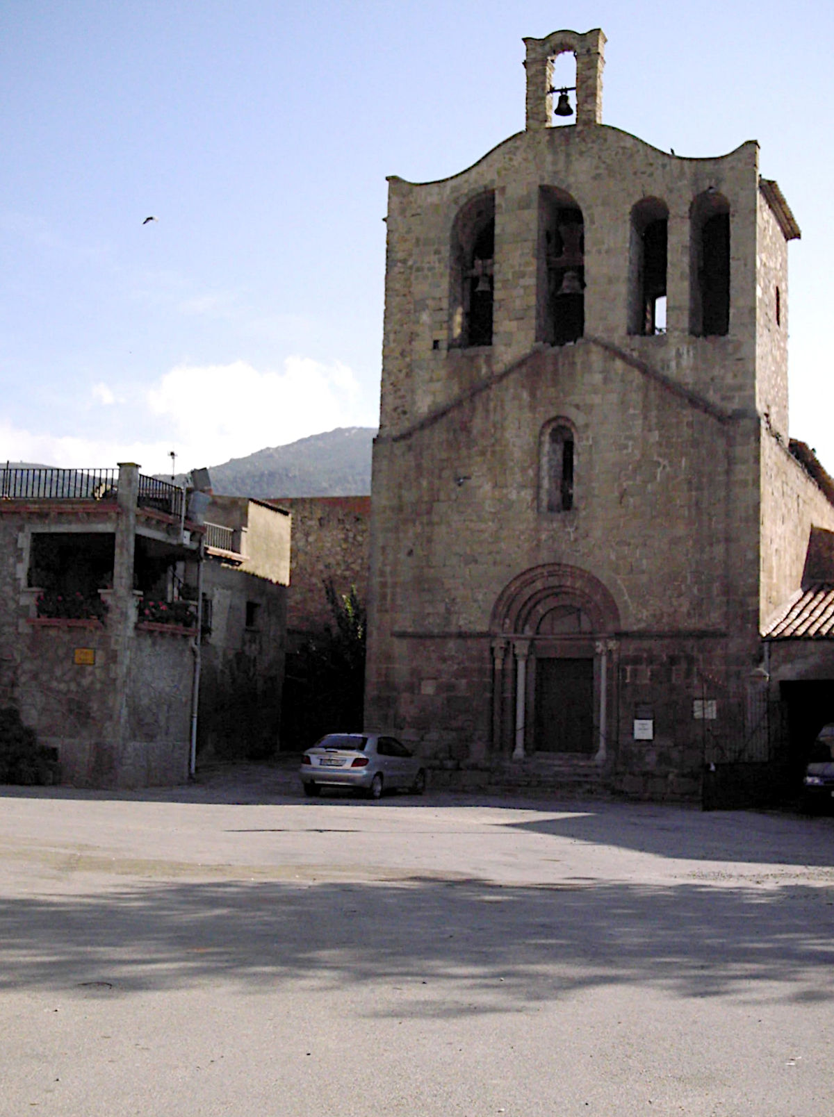 église de Pau (Alt Empordà)